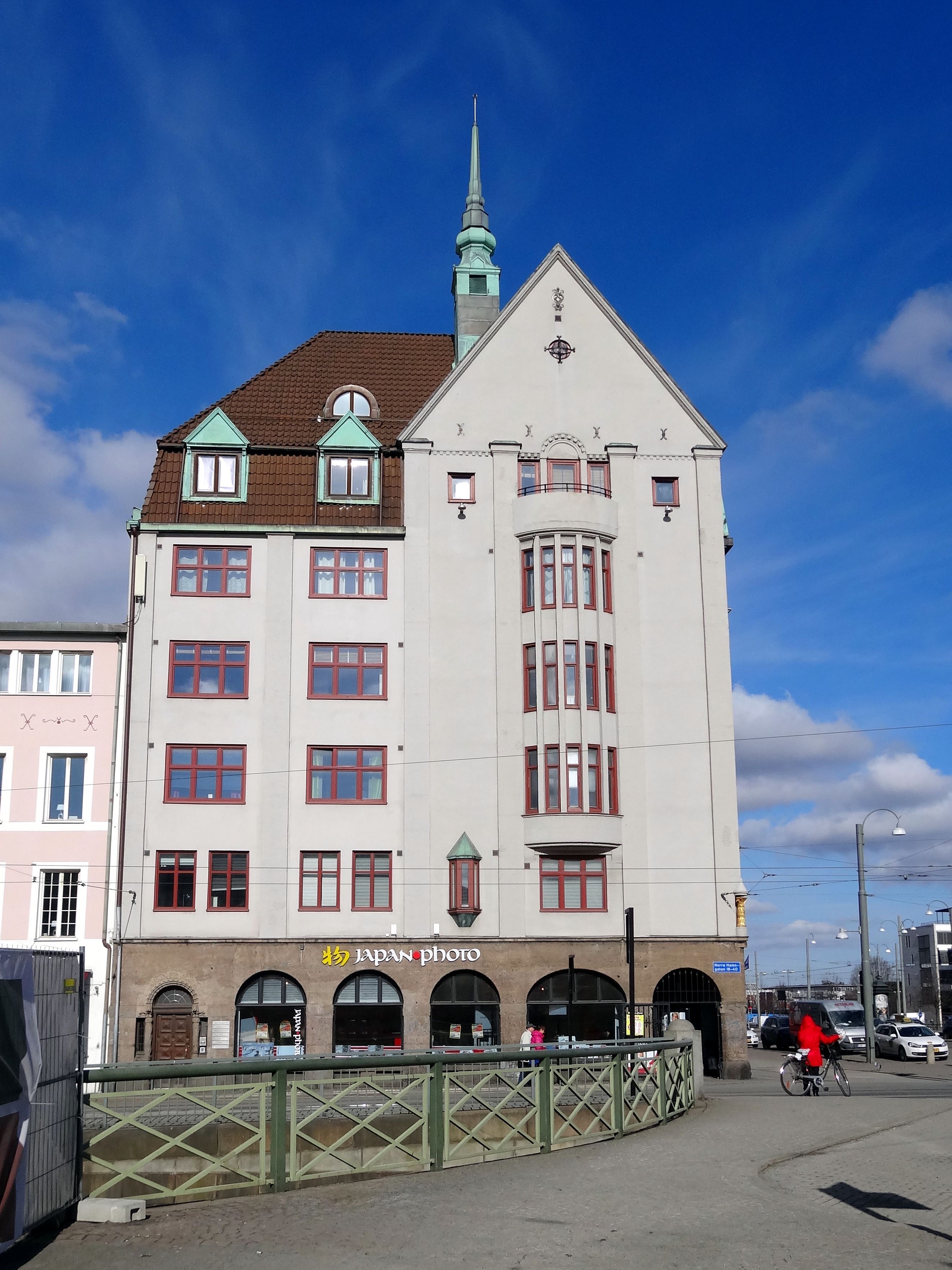 Norra Hamngatan 40 / Nils Ericsonsgatan 25 i Kvarteret 10 Kronobageriet, tomt 10:18, Göteborg.